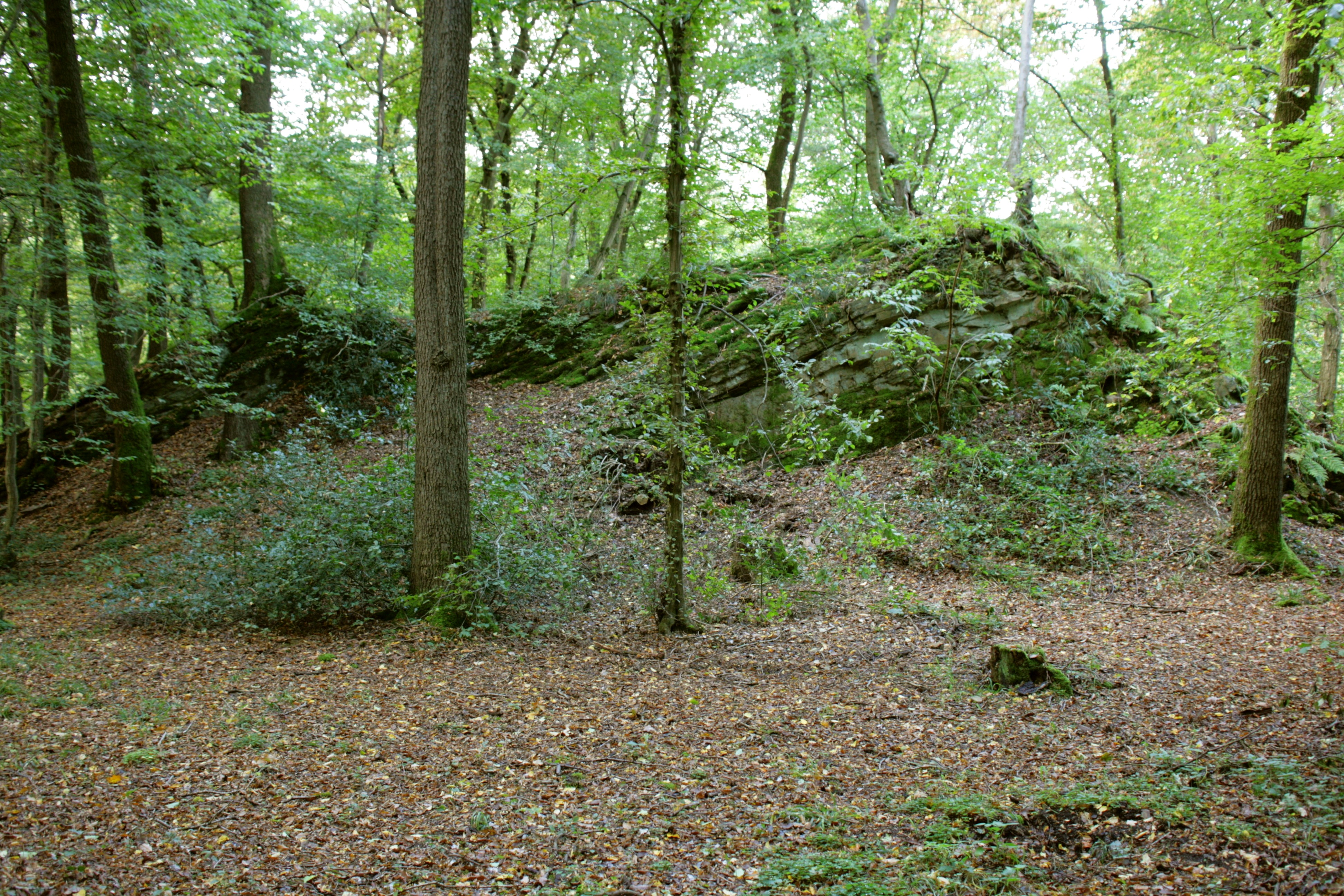 Burg Berge in Odenthal-Altenberg